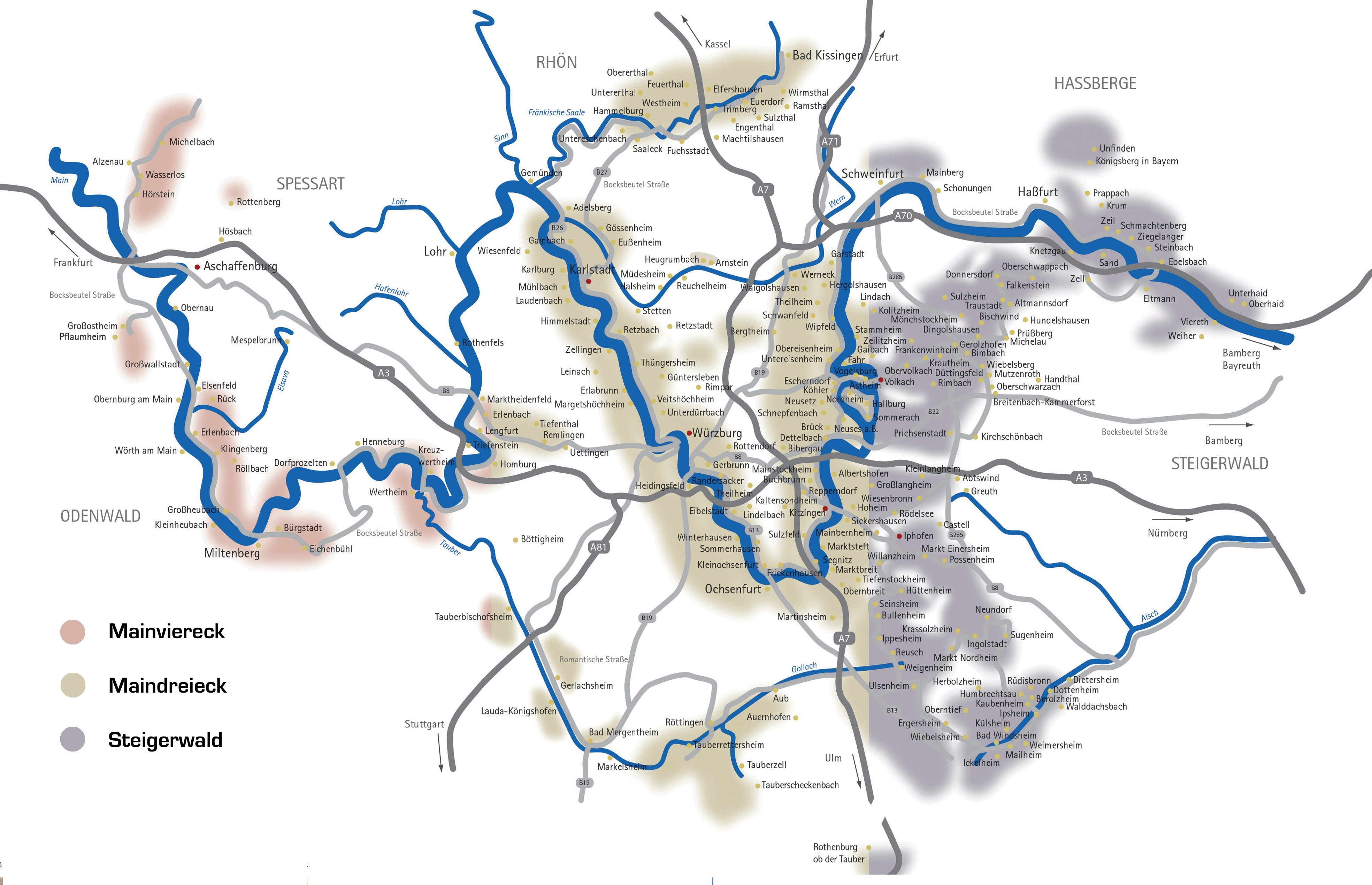 WeinFranken Foto: Fränkischer Weinbauverband e.V.